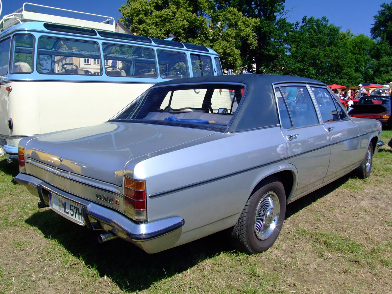 Opel Diplomat E Baujahr: 1972 165 PS 2800 ccm Quelle: selbst fotografiert, 06/2007 Fotograf: Späth Chr.